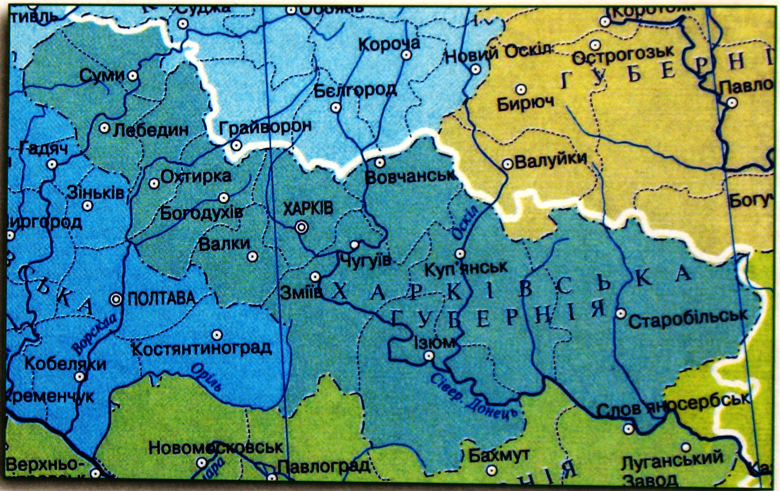 Карта Харьковской губернии в составе 11-ти уездов 1917 года. Белой линией проведена будущая граница между УССР и РСФСР.